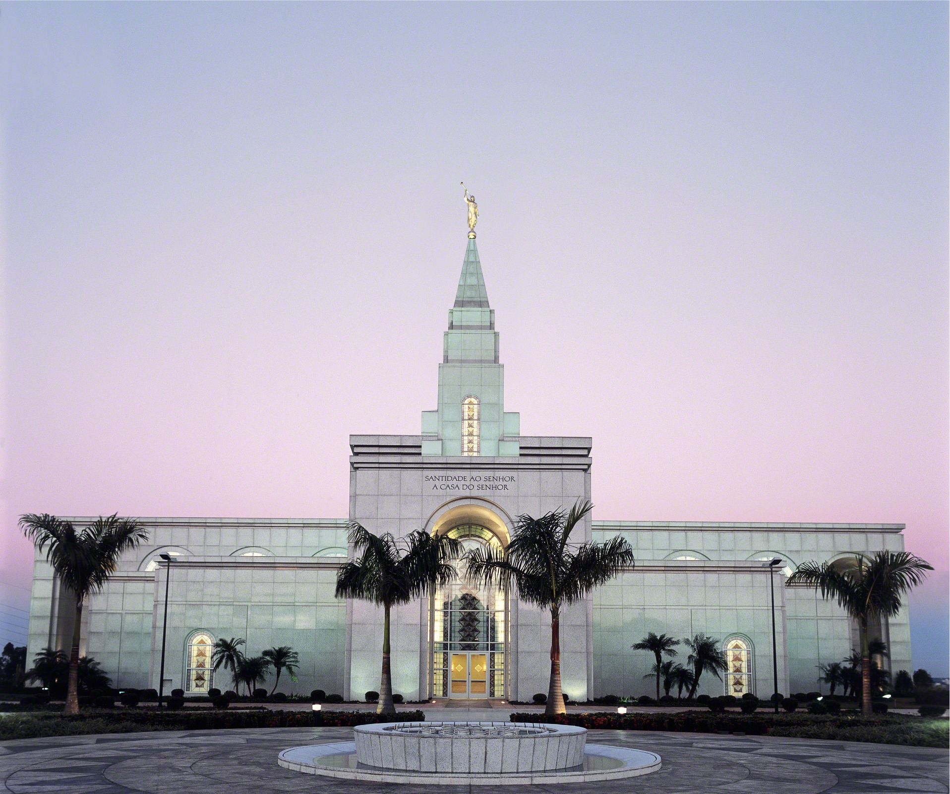 Templo de A Igreja de Jesus Cristo dos Santos dos Últimos Dias de Campinas